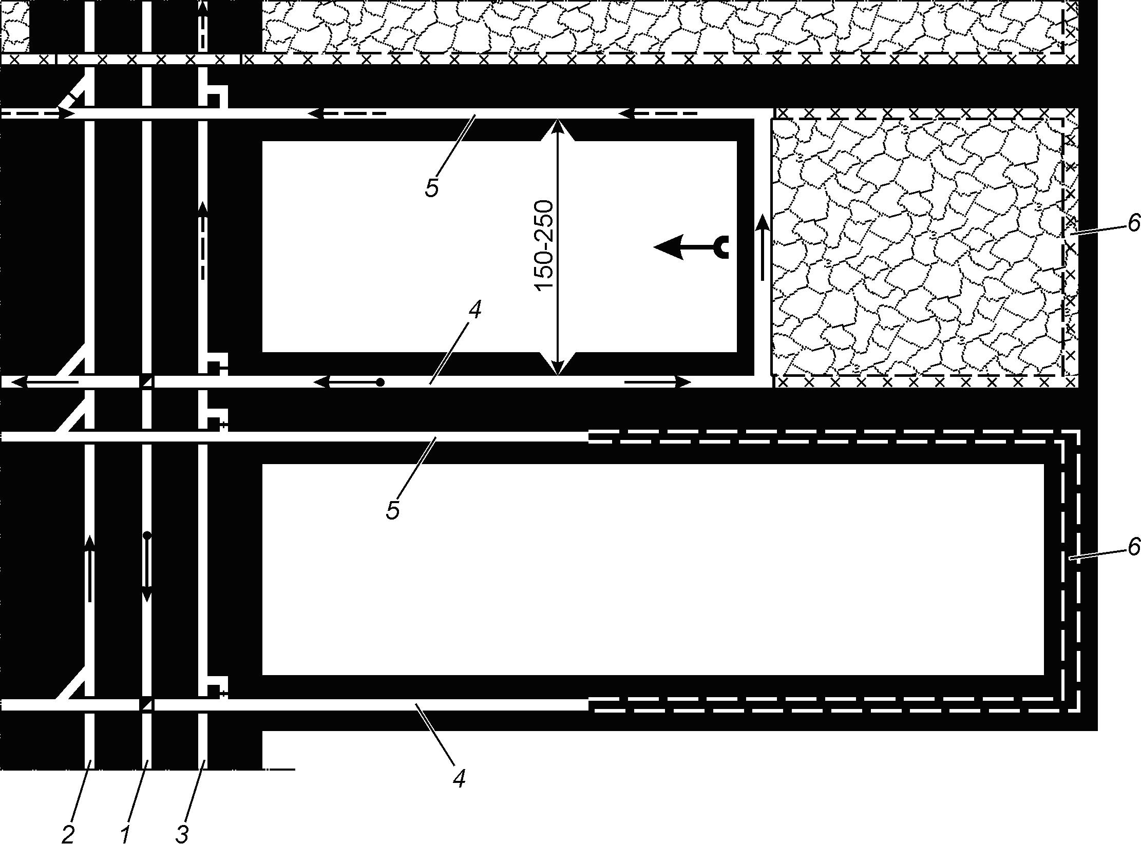 Схема